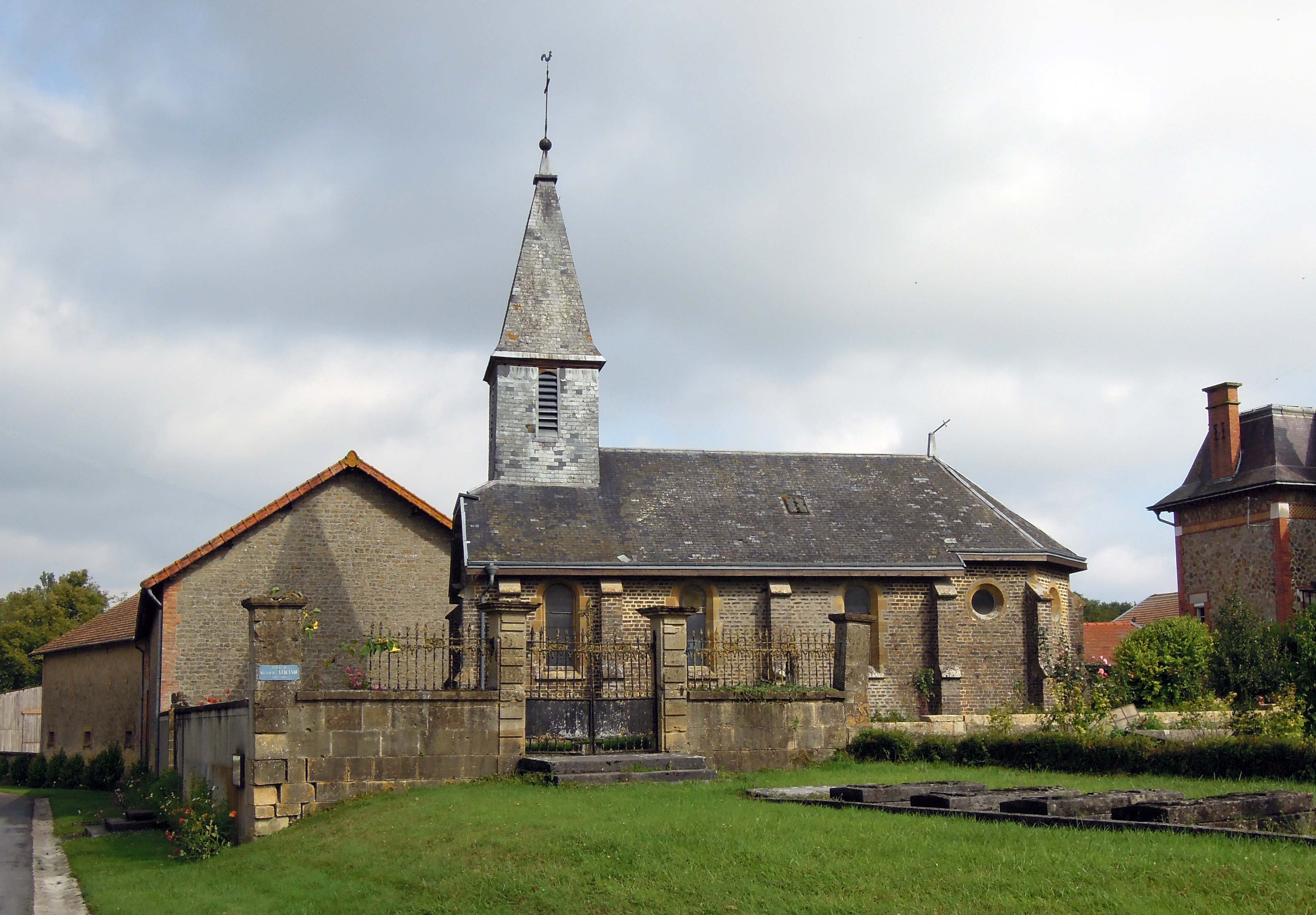 Église Saint-Martin, (Inscrit, 1928) .